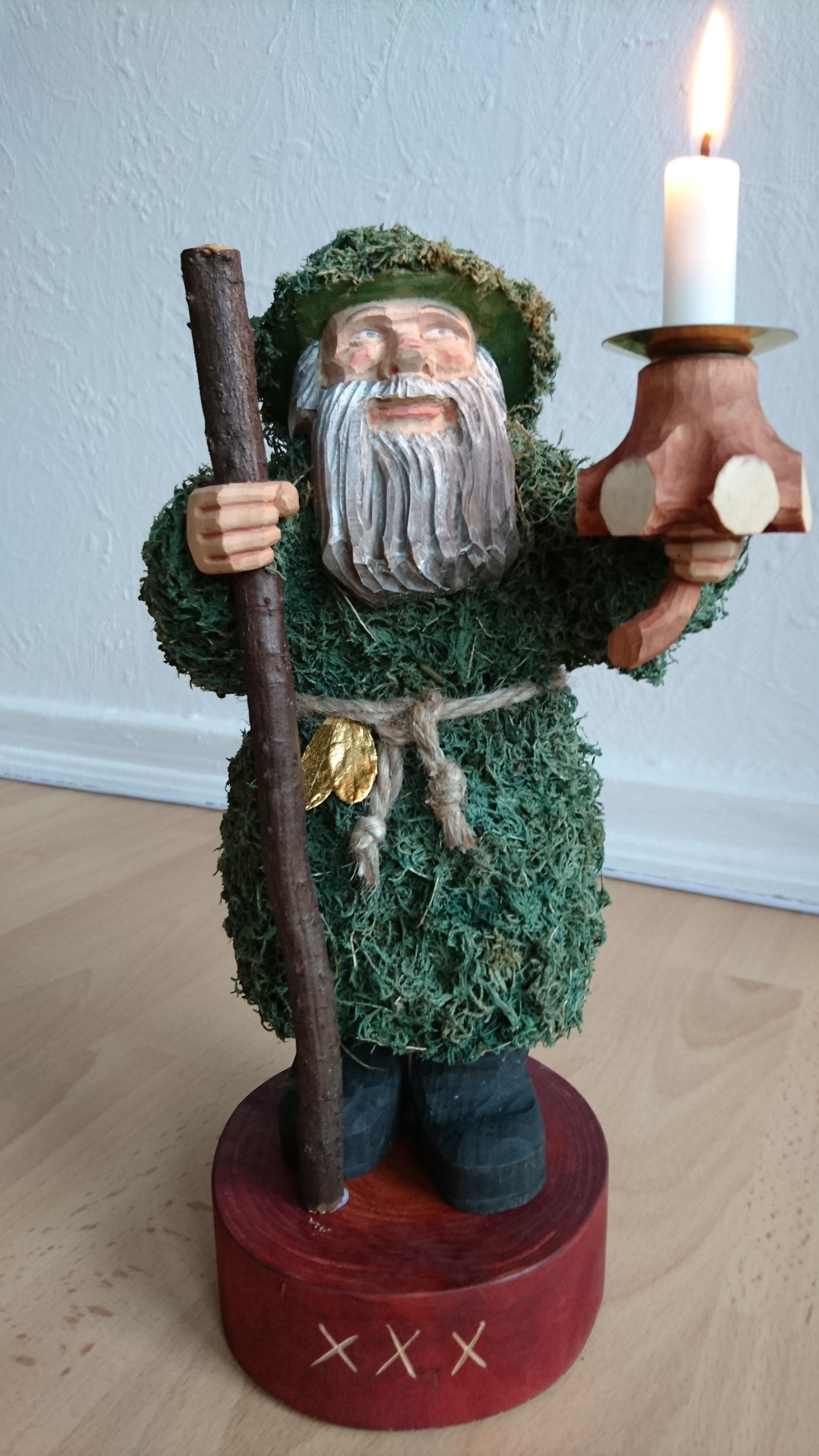 Klaus Schädlich, Vogtland, 2016